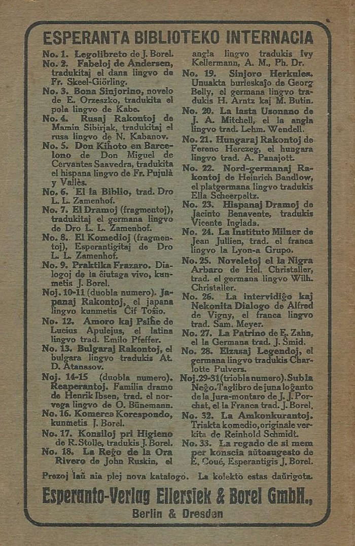 malantaŭa kovrilo de "La Regxo de la Ora Rivero aux La Nigraj fratoj", 1926